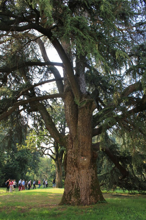 Un esemplare di cedro del Libano nel parco di Villa Annoni a Cuggiono (MI) - Italy